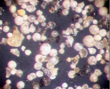 Алюмосиликатные микросферы. Загружено по Creative Common из Укровики.